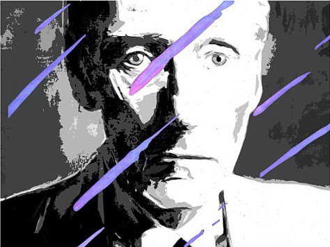 Christiaan Tonnis - William S. Burroughs / Video / 240 x 320 / 1:36 min. / 2006